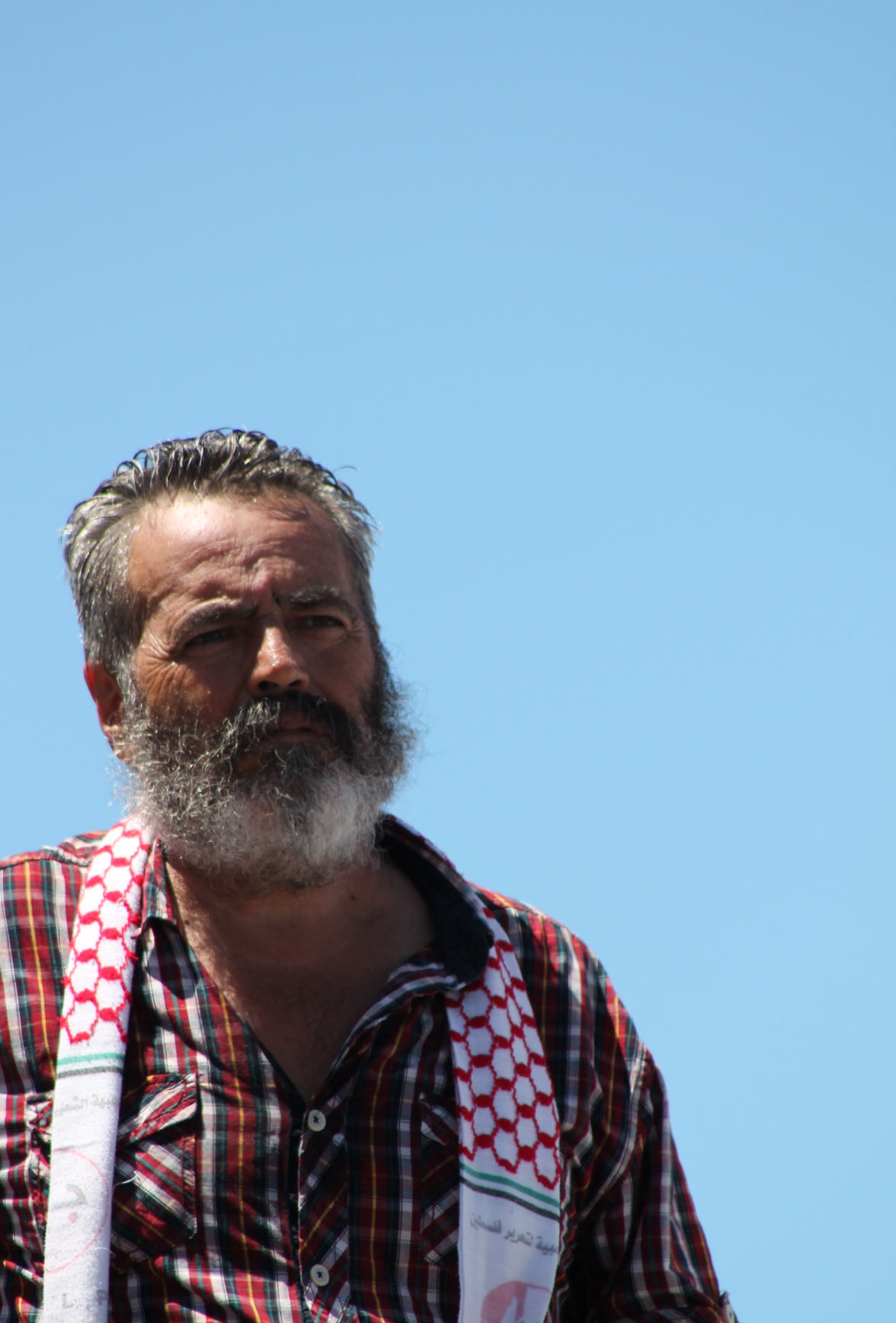 Juan Manuel Sánchez Gordillo durante la marcha obrera del SAT en Cádiz